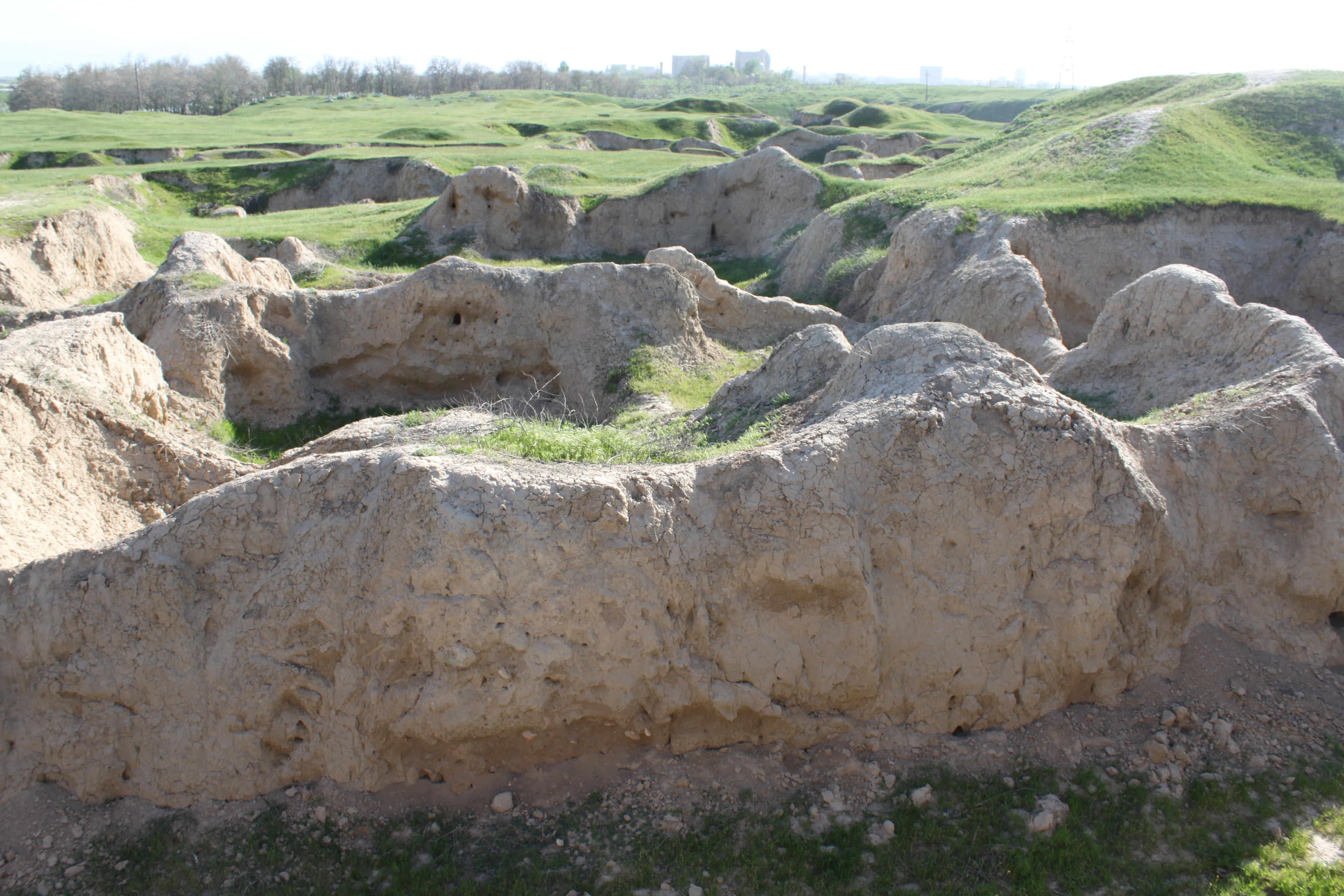 Vue sur l'ancien site d'Afrasiyab